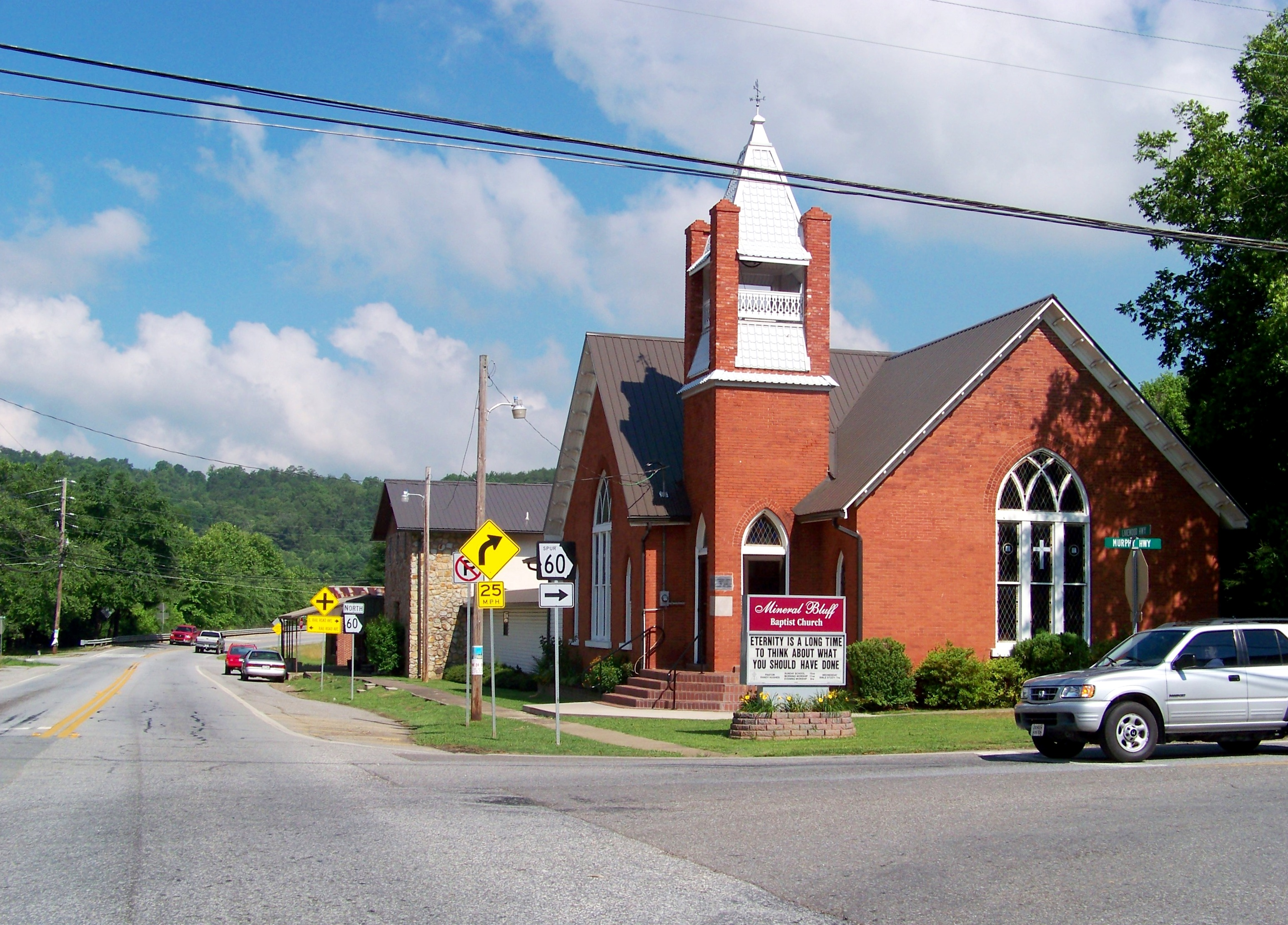 Mineral Bluff, Georgia